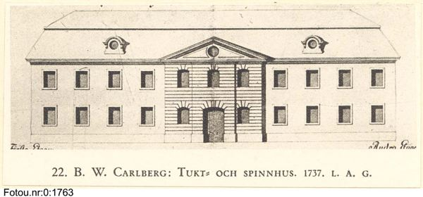 Tukt- och Spinnhus i Göteborg, Del av ritning av Bengt Wilhelm Carlberg, 1737. Göteborgs stadsmuseums samlingar.